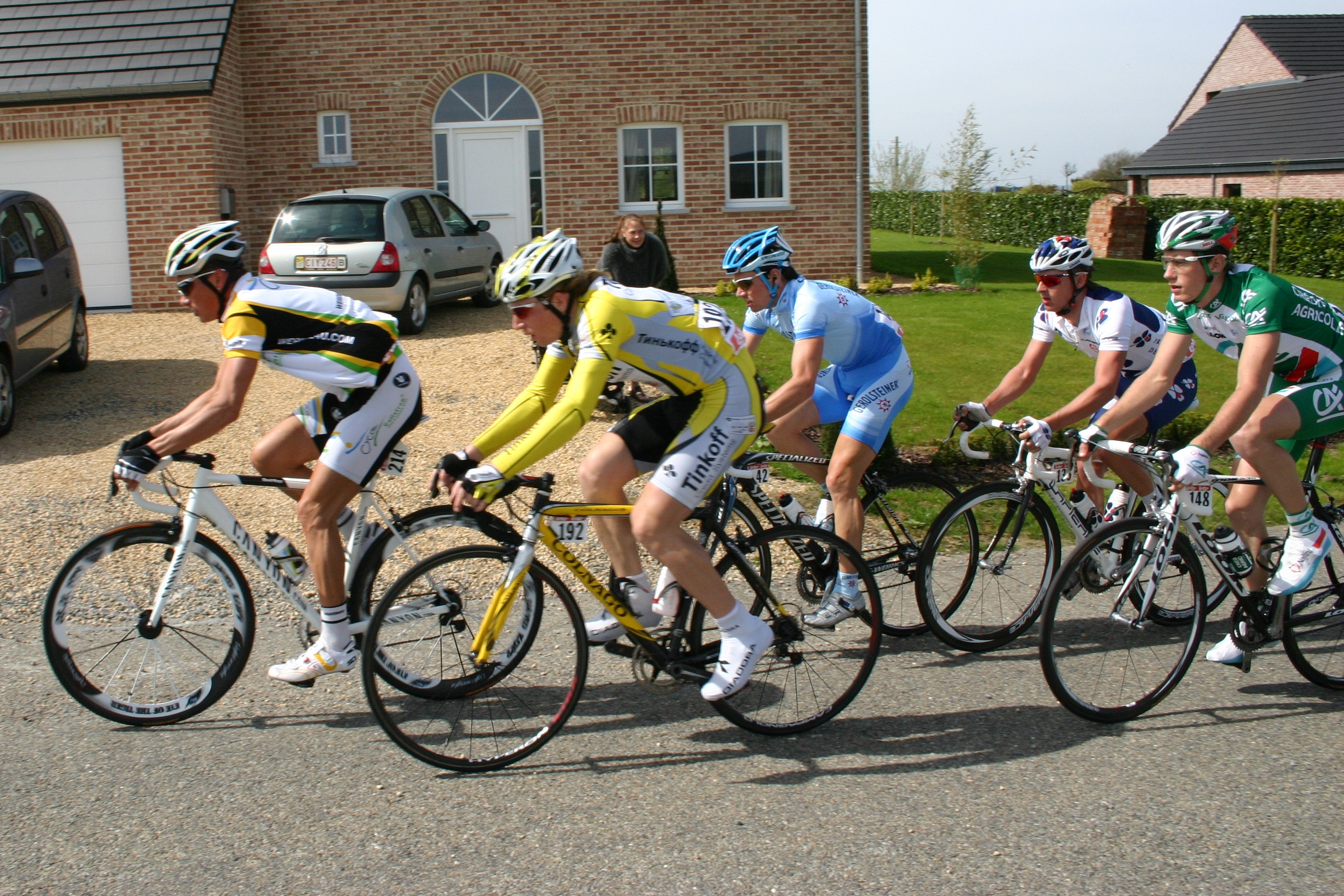 Liége-Bastogne-Liège 2008. Drëtt Echappée op der Kopp vun der Côte de Ny. Vu lénks no riets: David Kopp, Pavel Brutt, Markus Fothen, Tom Stubbe, Pierre Roland.